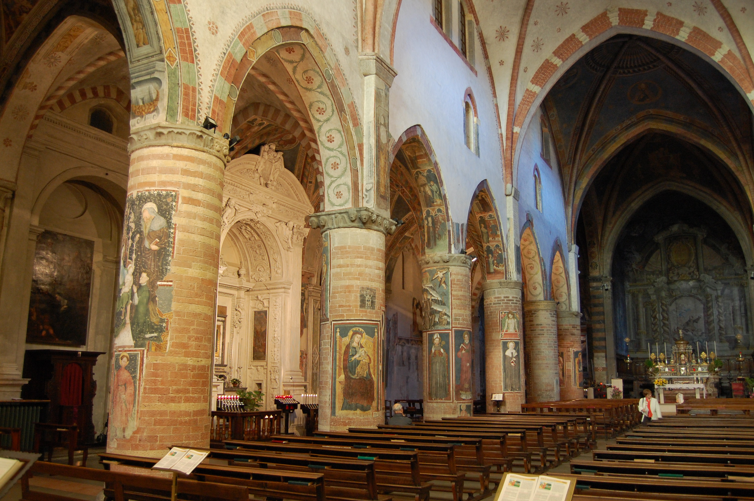 Interno della Chiesa di San Francesco, Lodi